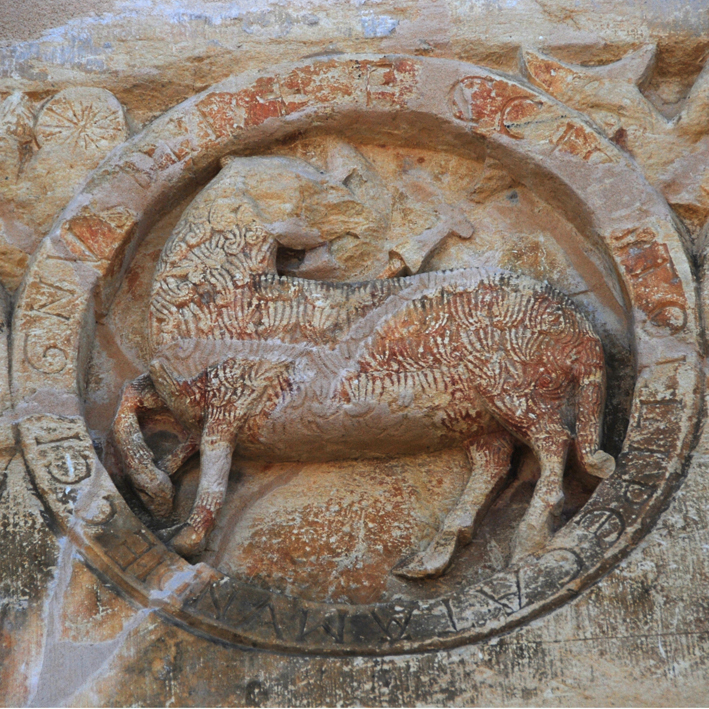 Église Saint-Julien, (Classé, 1945) .